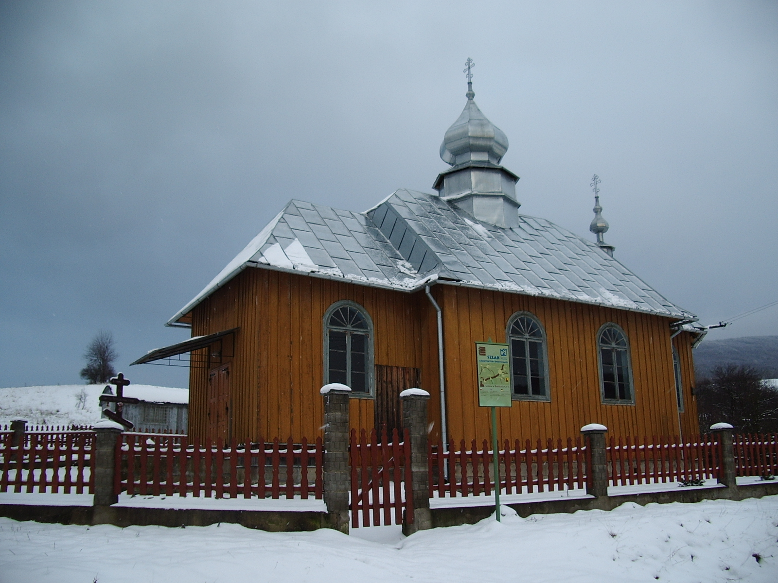 Bodaki - prawosławna cerkiew filialna p.w. św. Dymitra